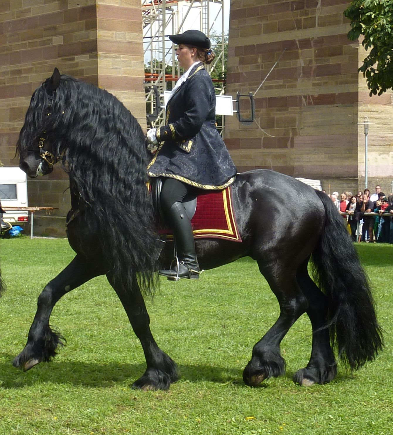 Pferdemarkt Bietigheim